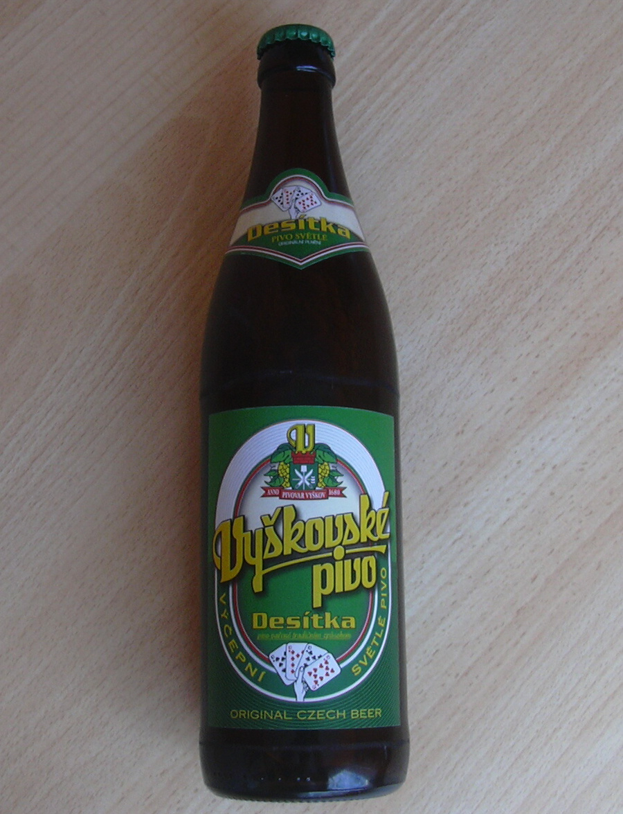 Vyškovské pivo (Beer- czech republic)